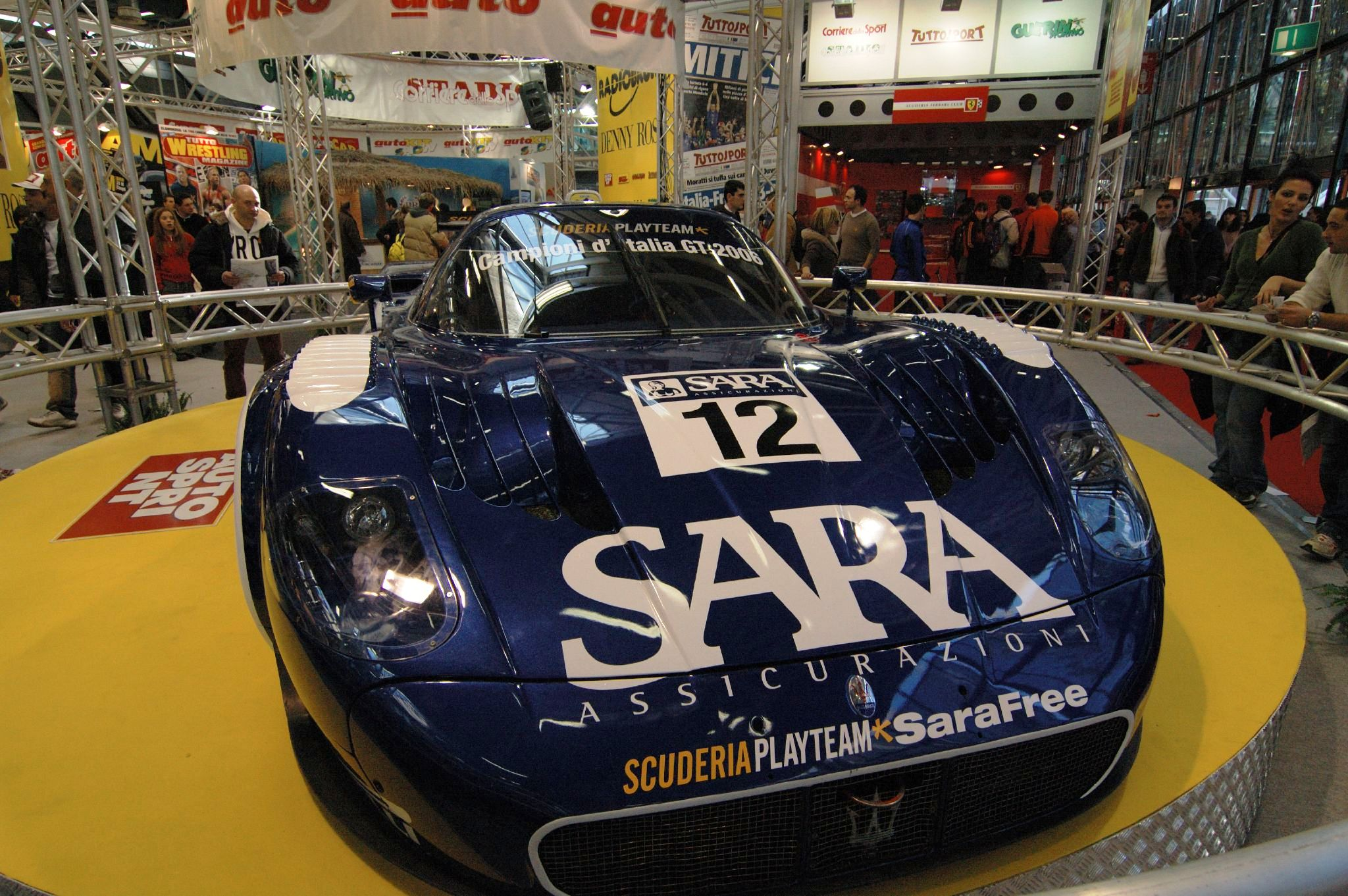 A Maserati MC12 Race car